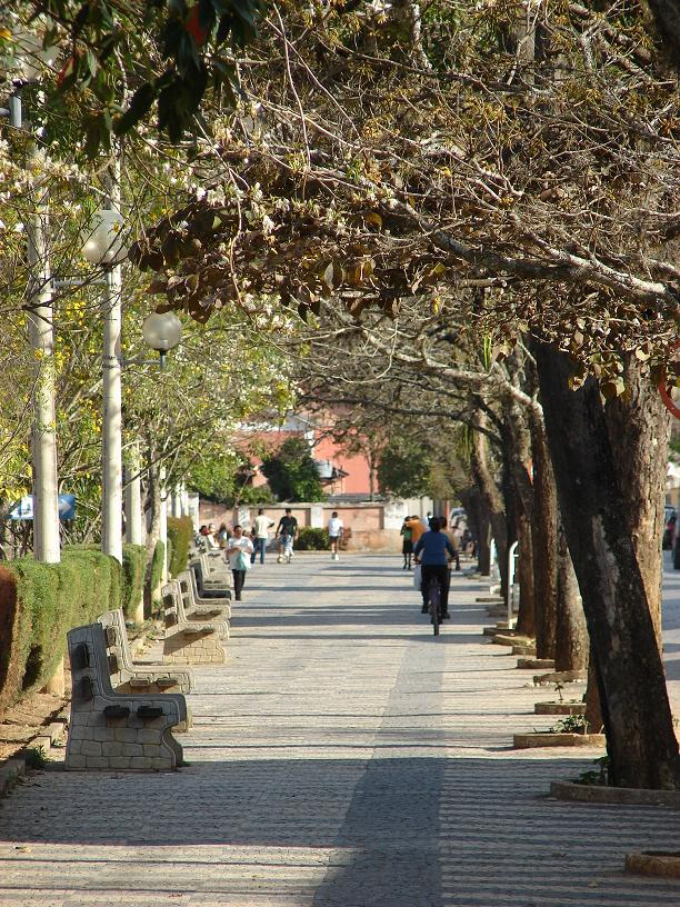 Passeio Público ao lado da Estação de Passa-Quatro em MG Autor: A. G. Freitas Neto Data: 16/09/2006 Fonte: Arquivo Particular OBS: Foto tirada com equipamento digital Sony H2 resolução 600x800 (alterada)